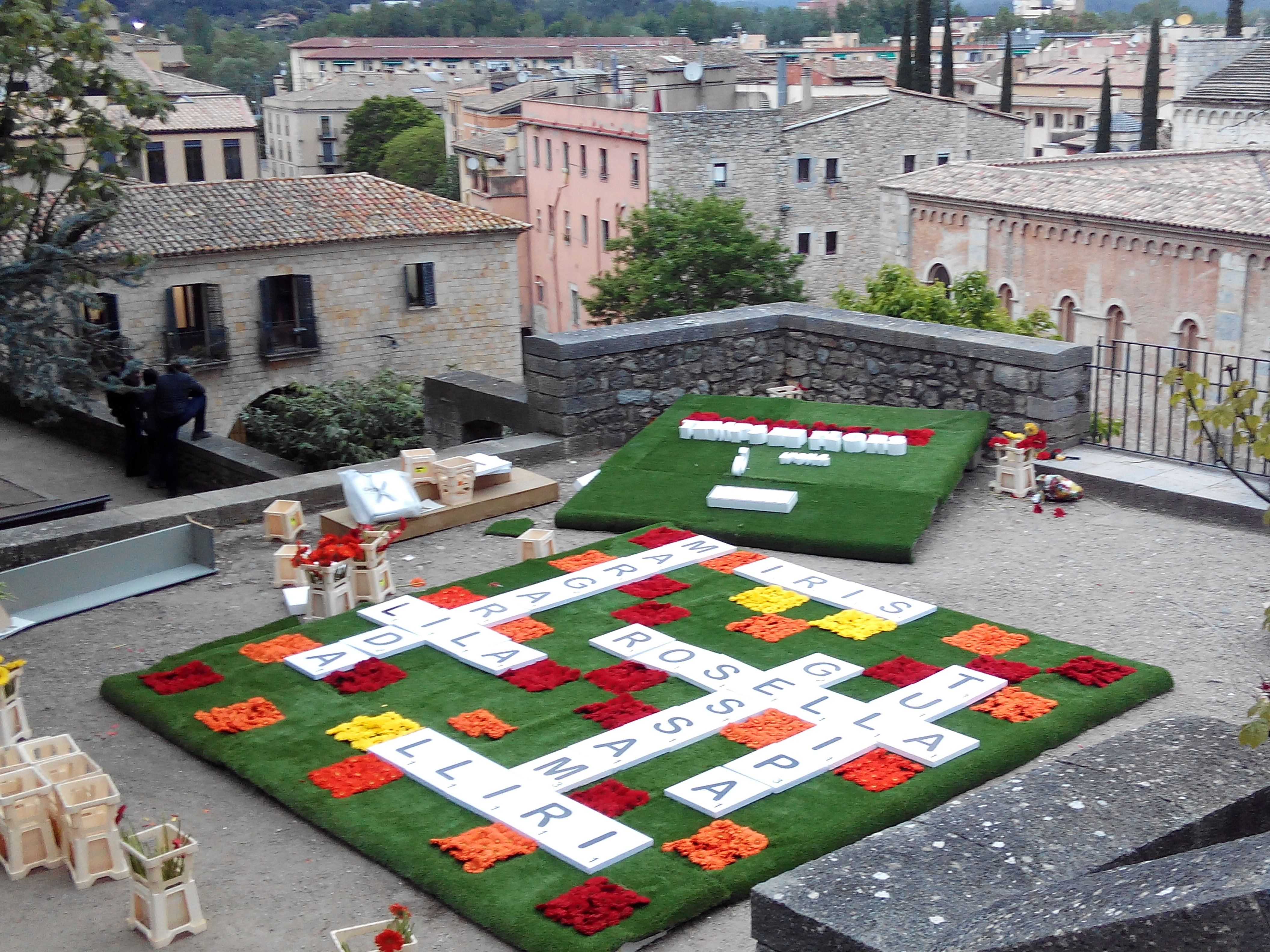 Scrabble en català a Temps de Flor de Girona